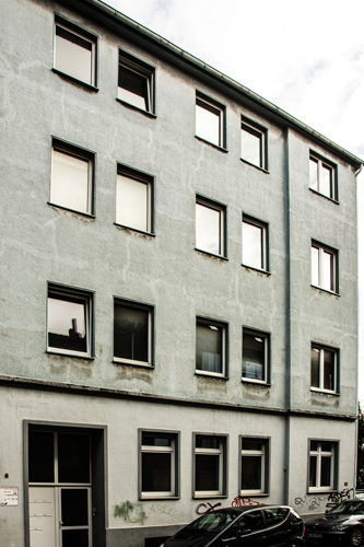 Wohnhaus von Norbert u. Helene Schweitzer in der Chemnitzer Str. 8